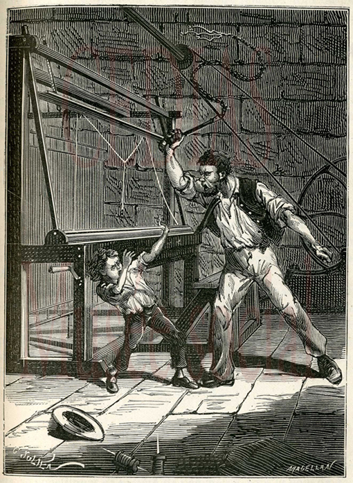 In : Histoire du socialisme depuis les temps les plus reculés jusqu'à nos jours, ou Efforts des réformateurs et des révoltés à travers les âges, 2. Histoire du socialisme en France depuis la Révolution française jusqu'en 1878 / Benoît Malon / Paris : Derveaux (1883)